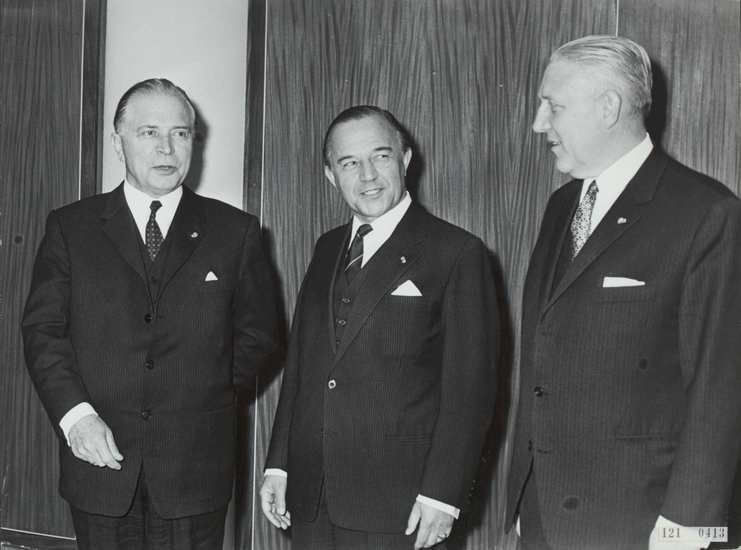 Collectie / Archief : Fotocollectie Rijksvoorlichtingsdienst Eigen Reportage / Serie : [ onbekend ] Beschrijving : Benelux conferentie te Den Haag. De premiers van de drie landen; vlnr. P. Werner (Luxemburg), P. de Jong, Gaston Eijskens (België) Datum : 28 april 1969 Locatie : Den Haag, Zuid-Holland Trefwoorden : conferenties, groepsportretten, internationale organisaties, ministers Fotograaf : Fotograaf Onbekend / Anefo Auteursrechthebbende : Nationaal Archief Materiaalsoort : Foto (zwart/wit) Nummer archiefinventaris : bekijk toegang 2.24.10.02 Bestanddeelnummer : 121-0413